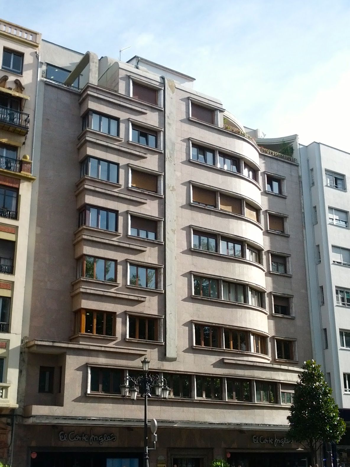 Fachada del edificio del antiguo cine Aramo, en la calle Uría de Oviedo (Asturias), en España.